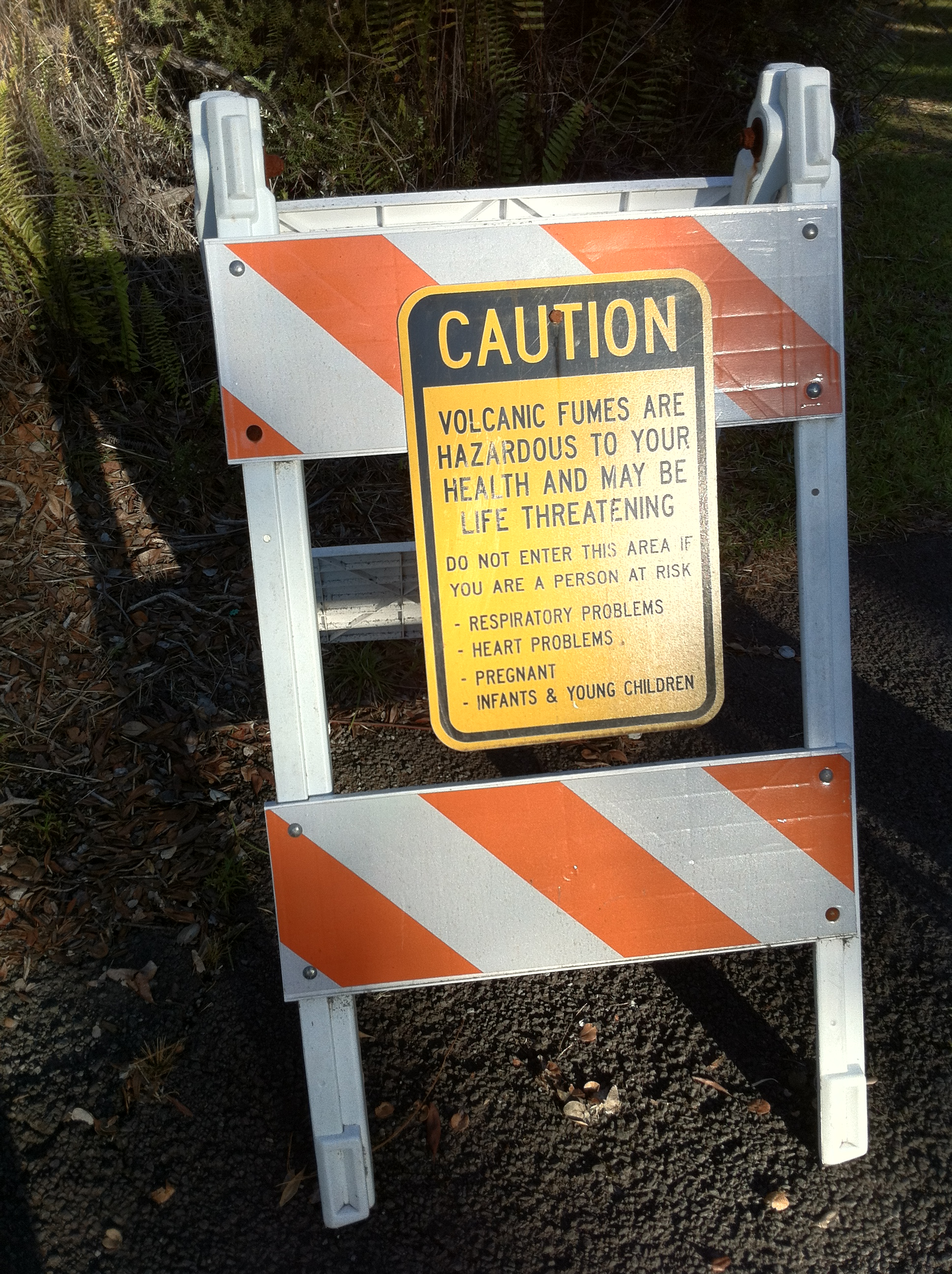 Предупреждение о вулканических газах